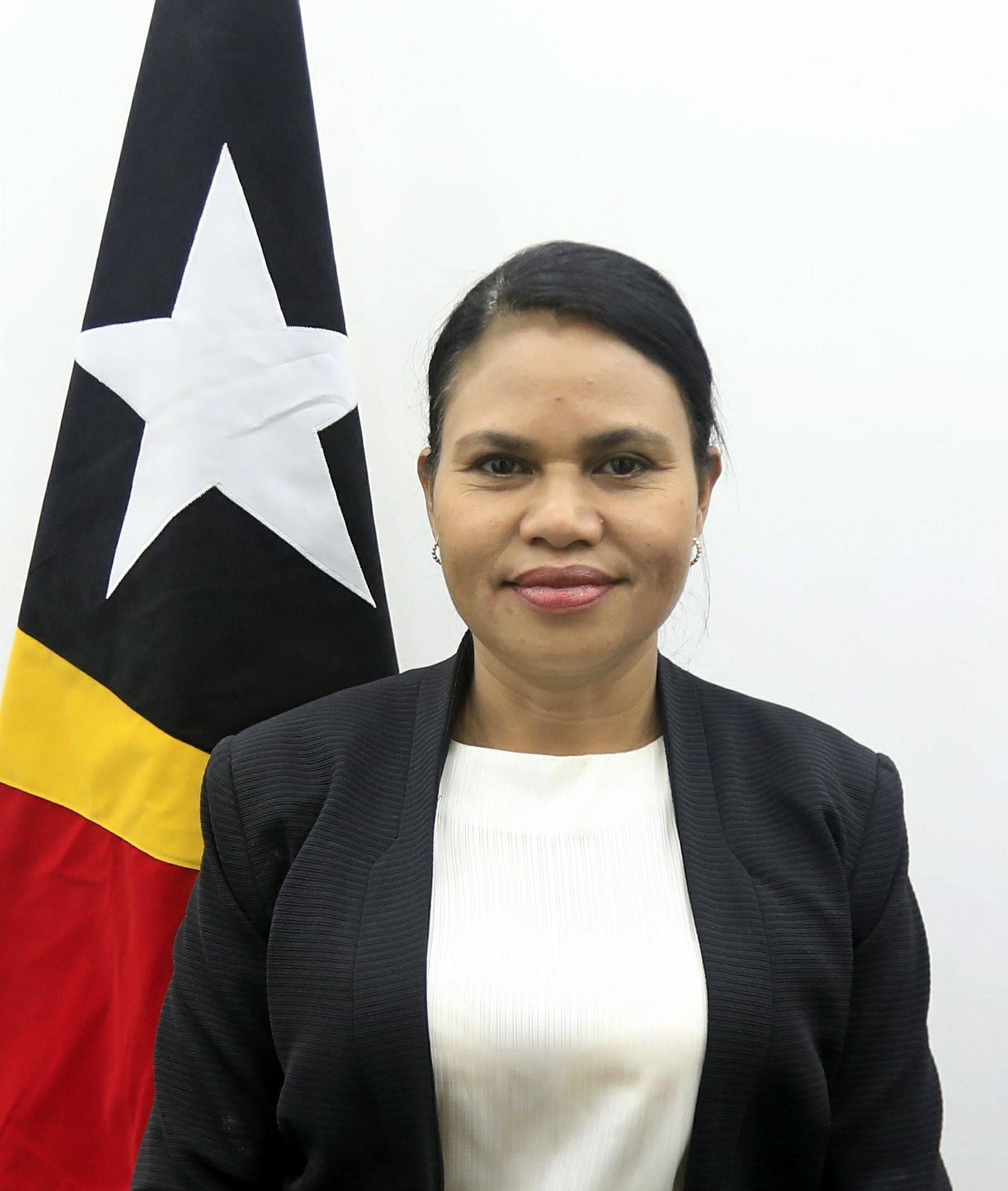 Armanda Berta dos Santos, Ministra da Solidariedade Sosial e Inclusão